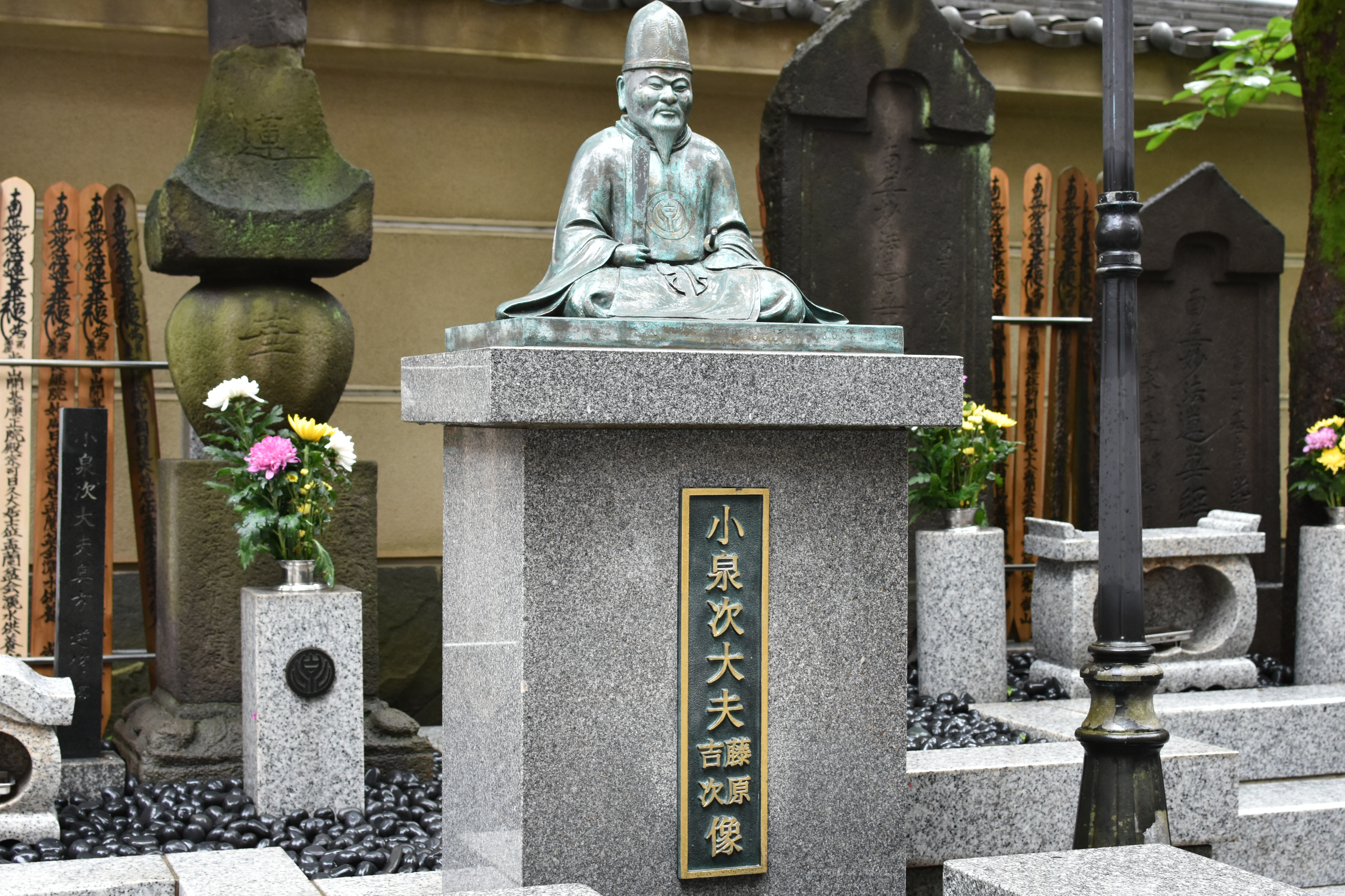 小泉次大夫の像および逆修塔（川崎区宮前町「妙遠寺」境内、2019年7月）